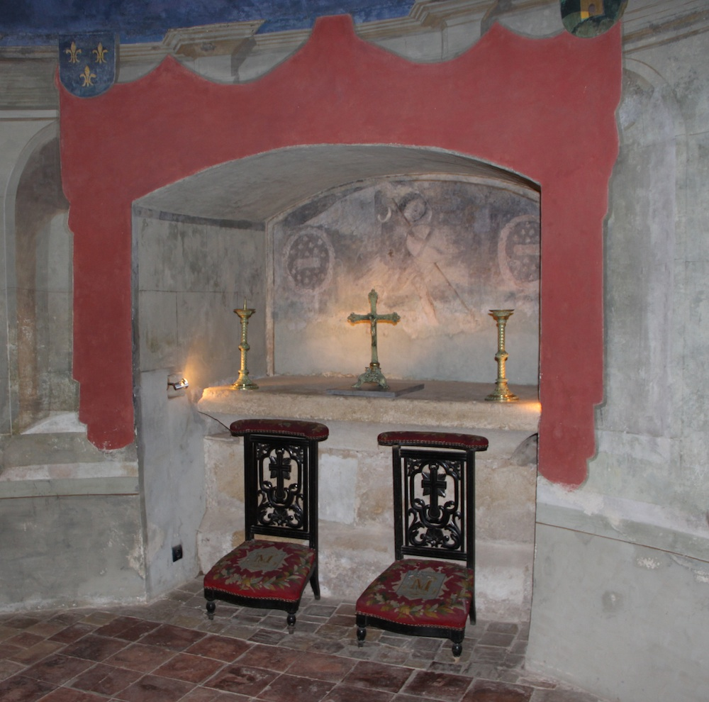 Oratoire de Montaigne, au rez-de-chaussée de sa Tour.